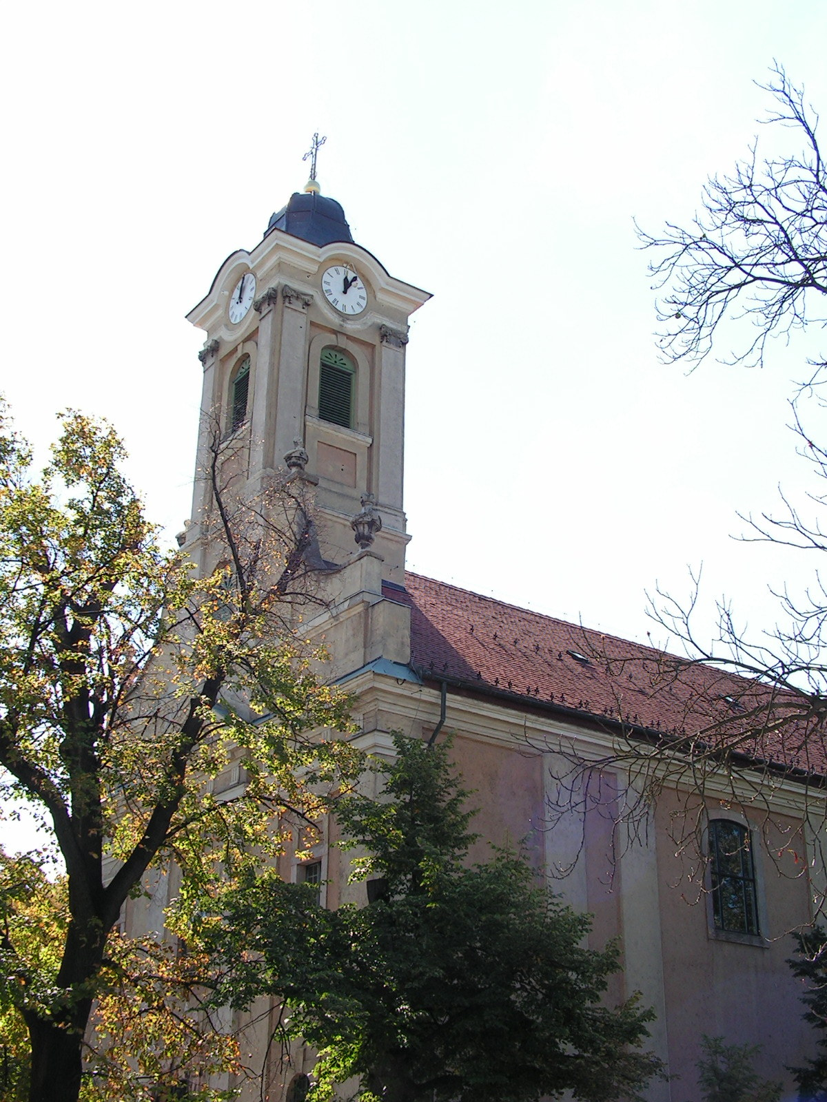 Solymár, Szűz Mária neve római katolikus templom. author: Szigetvári, Péter